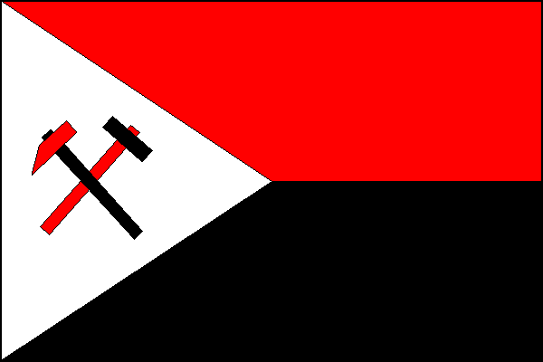 vlajka, Sobotín, okres Šumperk